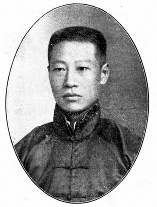 中華民國國會議員